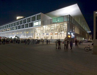 Stade de Suisse in Bern, Switzerland